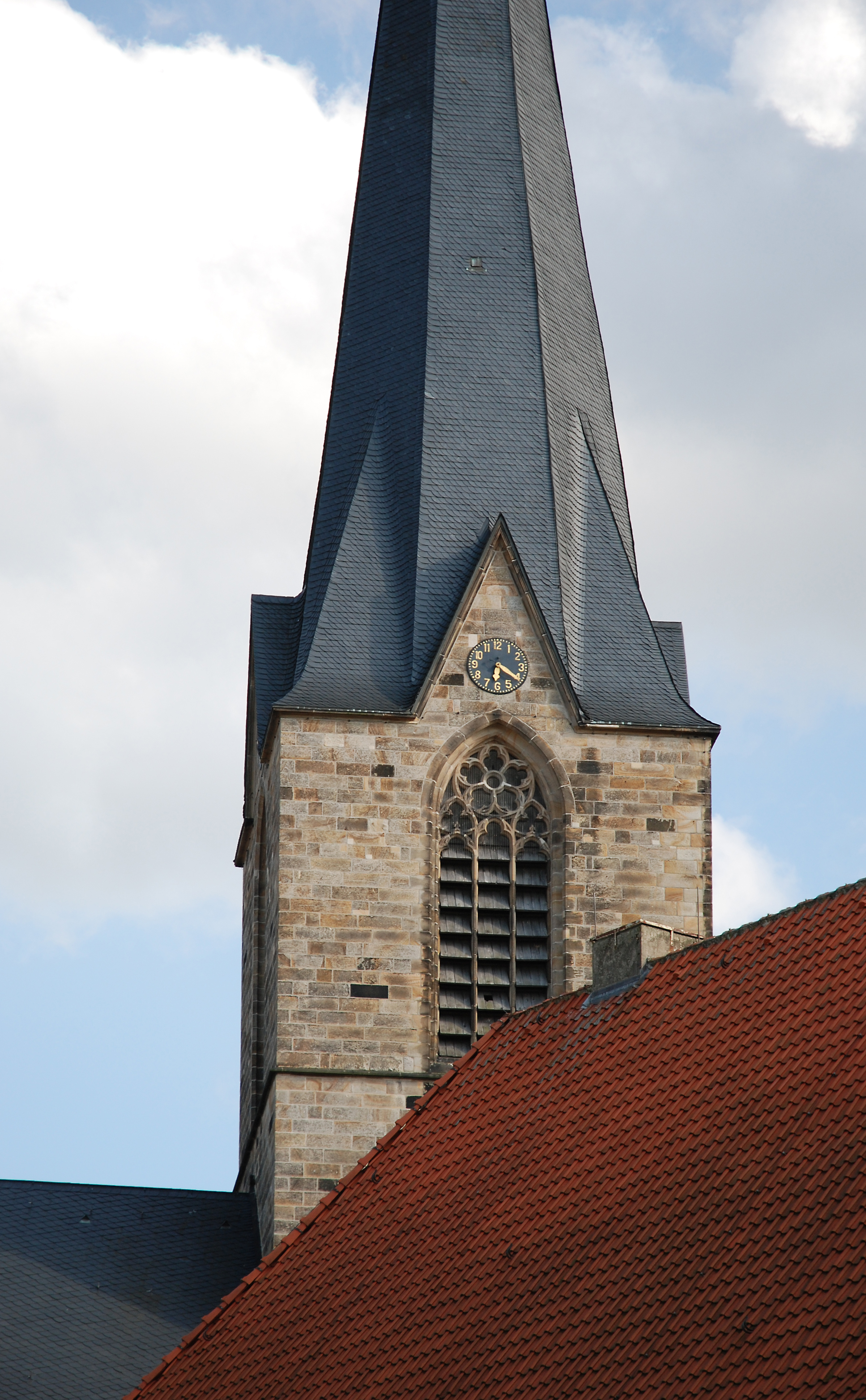 Werne, Kath. Pfarrkirche St. Christophorus, ehem. St. Johannes Bapt., Turm aus dem 15. Jh.; Nordseite